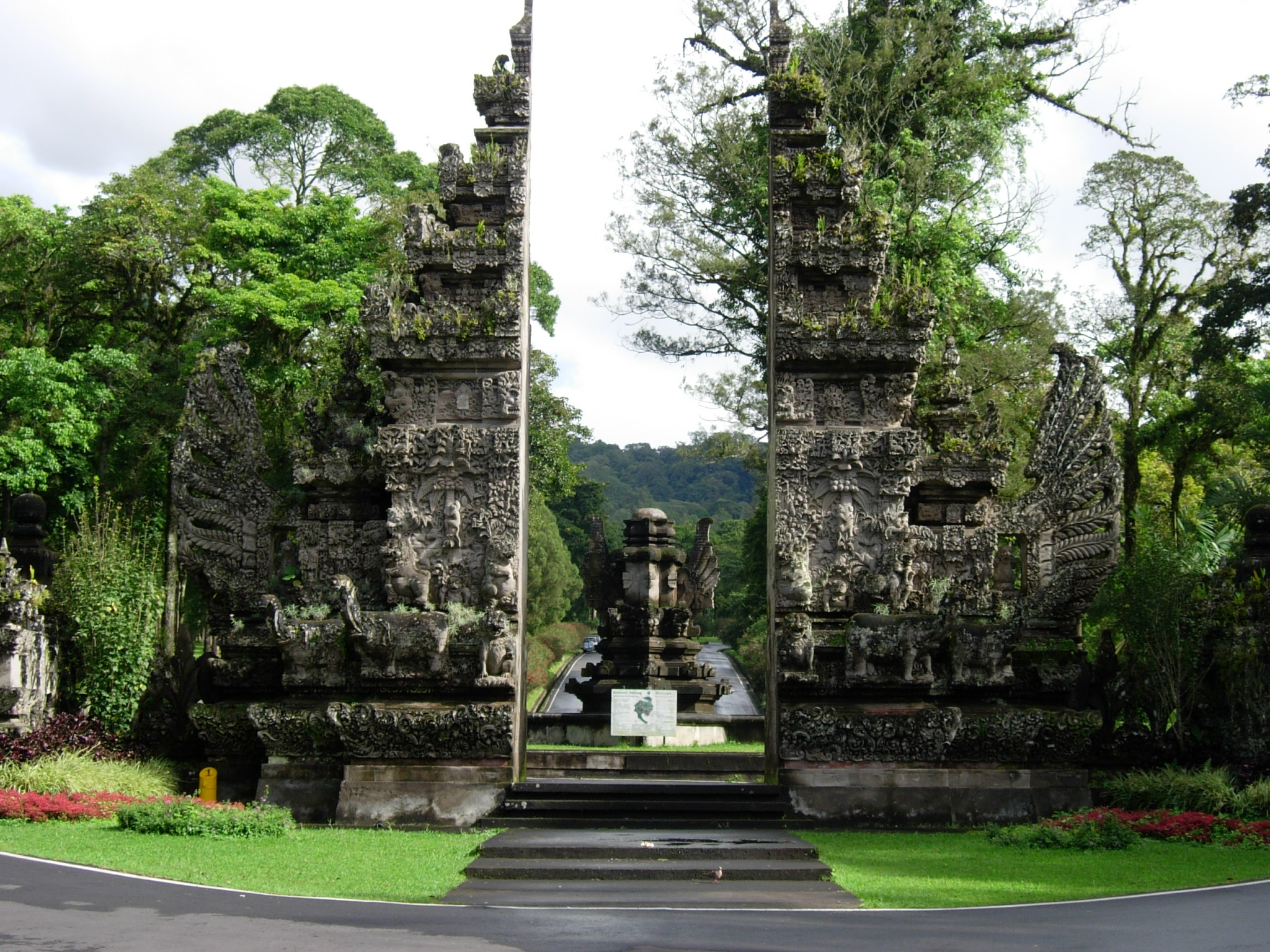 Kebun Raya Bali - Indonesia From indonesian Wikipedia.